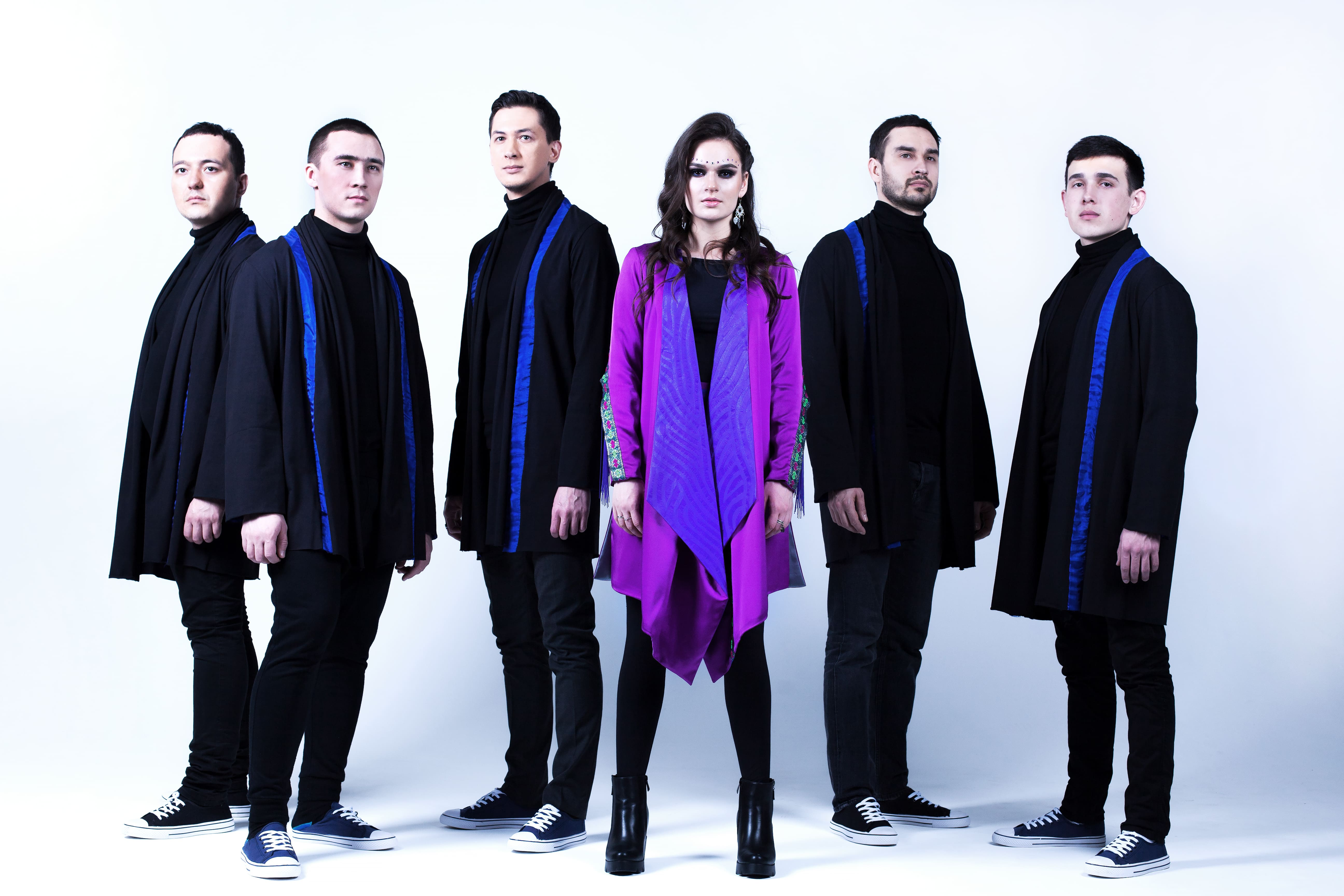 Группа Заман